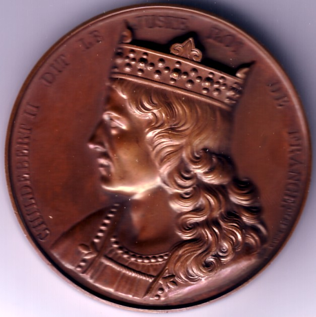 Childebert III, roi de Bourgogne et Neustrie et de Clotilde